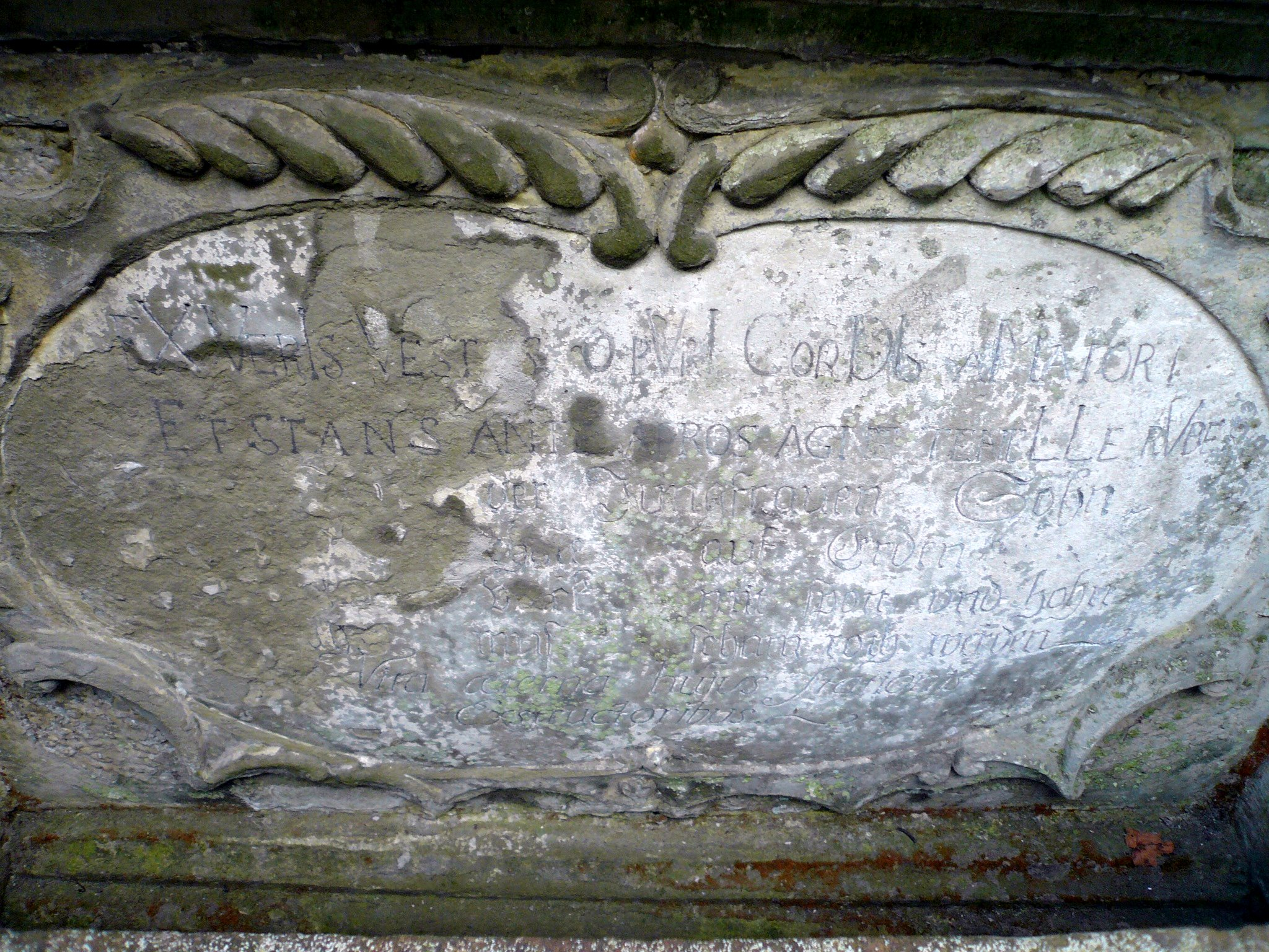 Kapellenkreuzweg Kloster Altstadt, Station 10, Inschrift